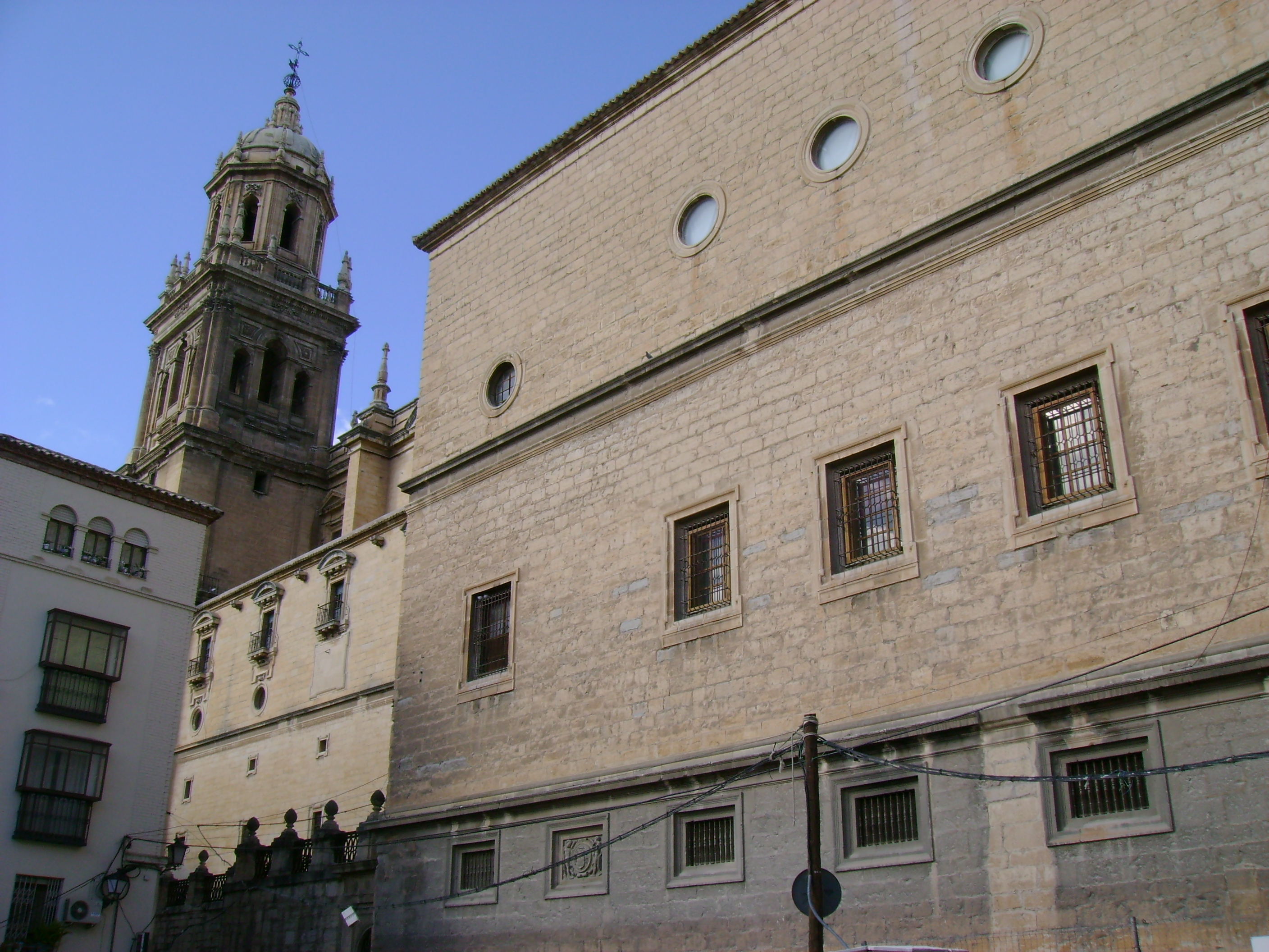 Vista efímera del lado este de la Catedral de Jaén.